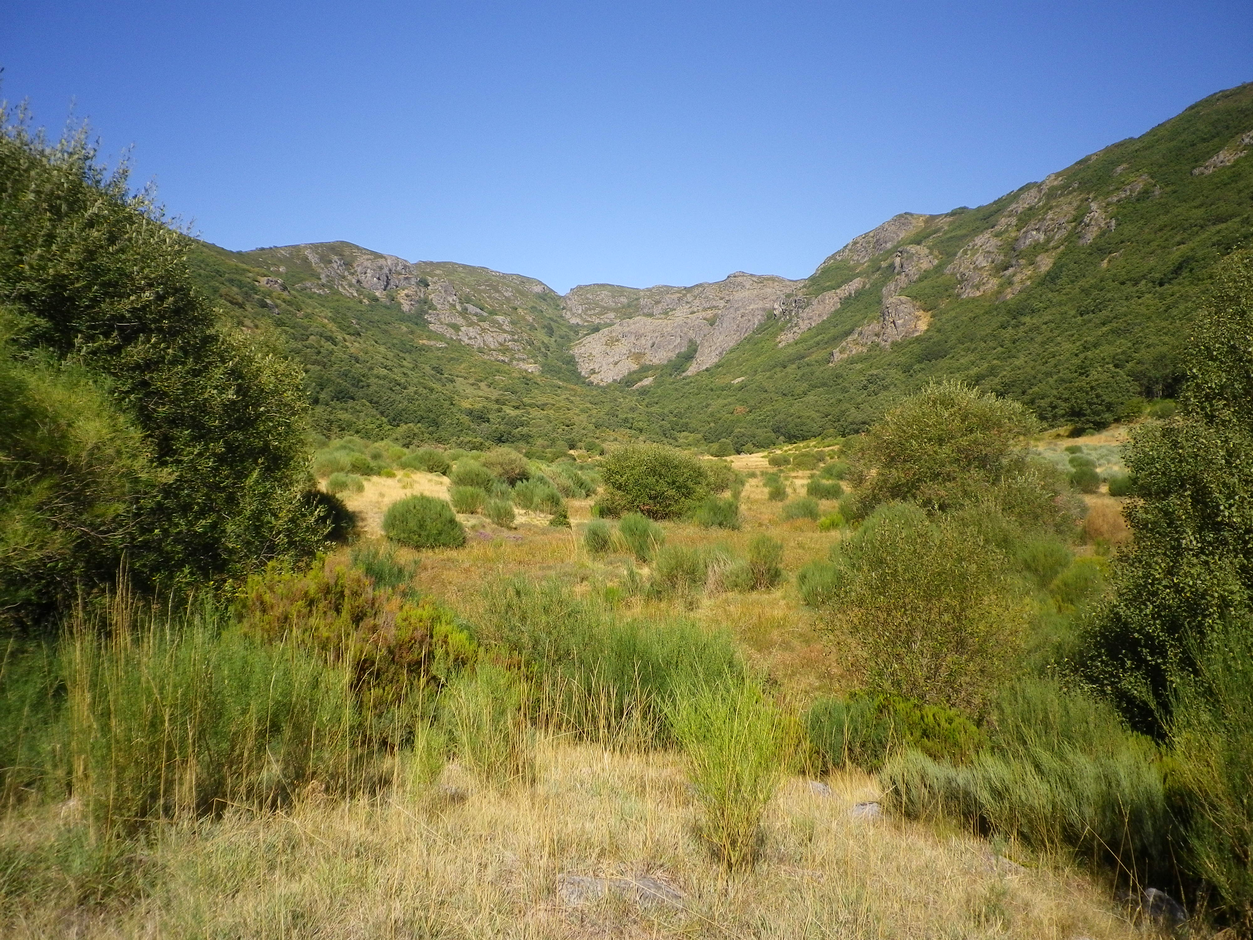 Valle glaciar ubicado en en el Parque Natural del Lago de Sanabria, perteneciente a la localidad de Santa Colomba de Sanabria, en el municipio de Cobreros...